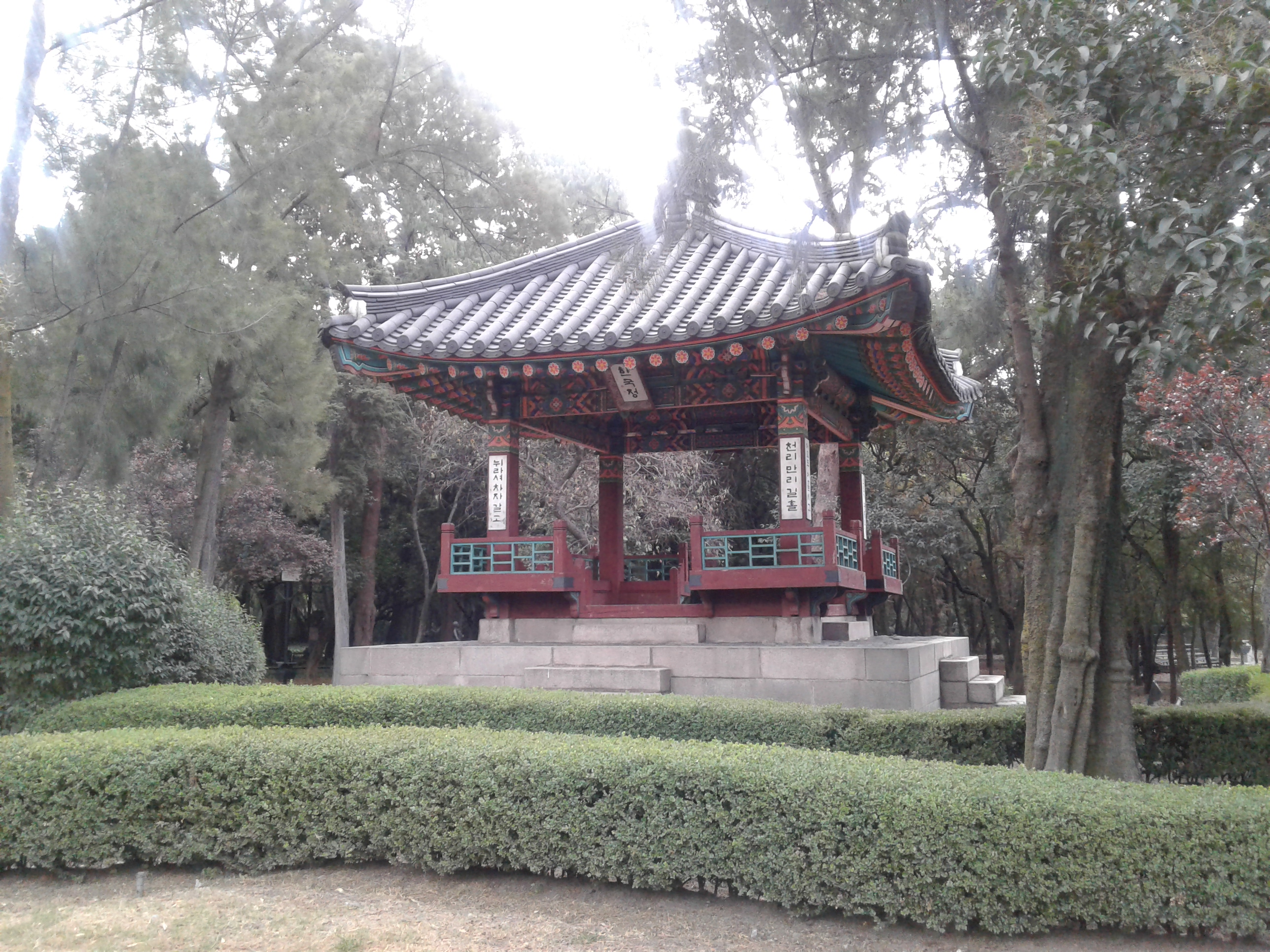 Pabellon coreano CDMX